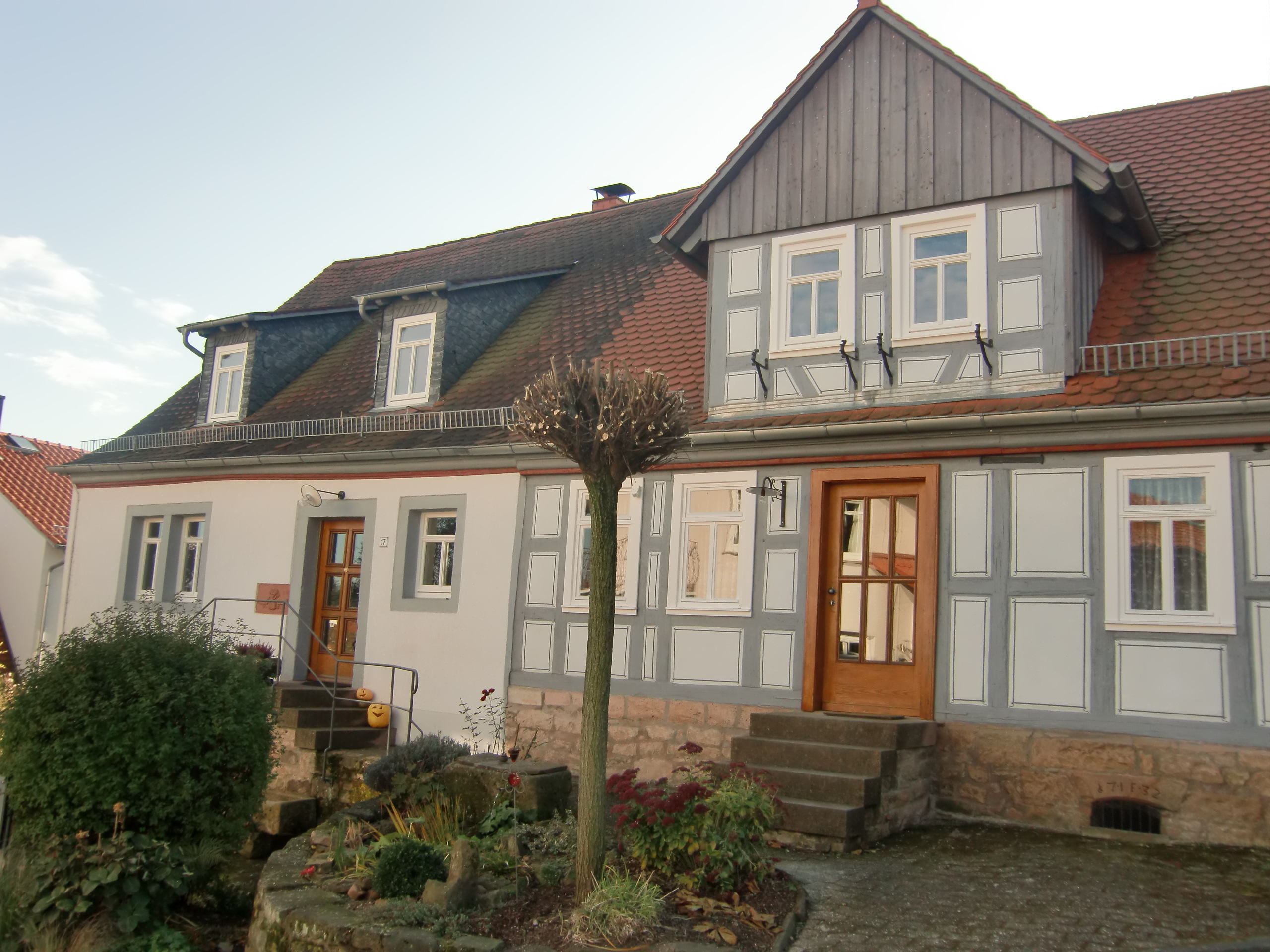 Alte Vielbrunner Oberförsterei, erbaut Anfang des 18. Jahrhunderts